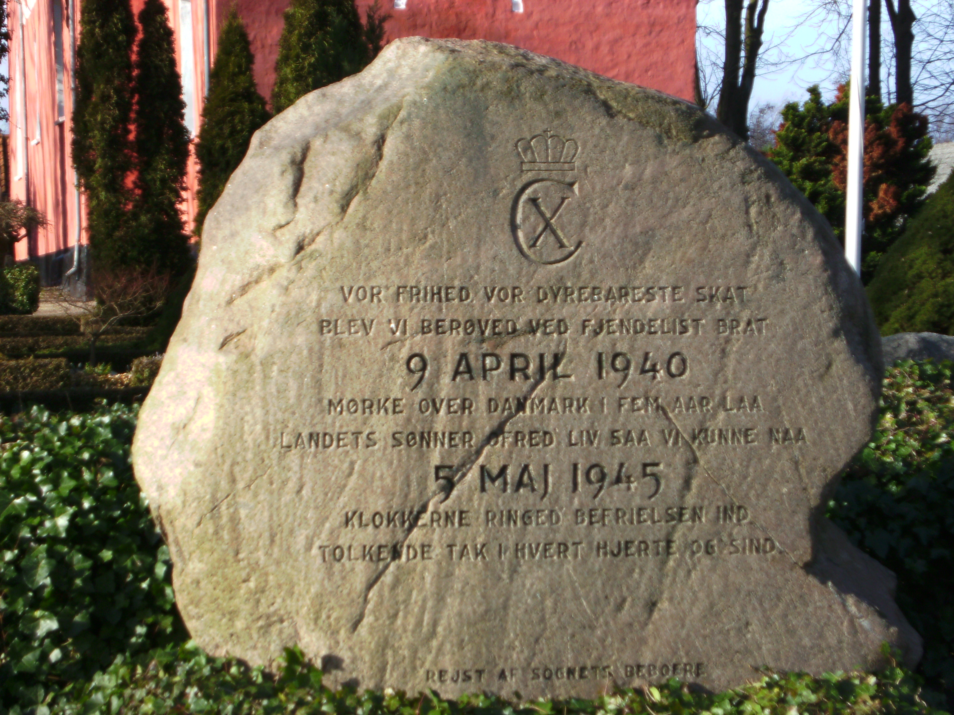 Mindesten ved Herritslev Kirke